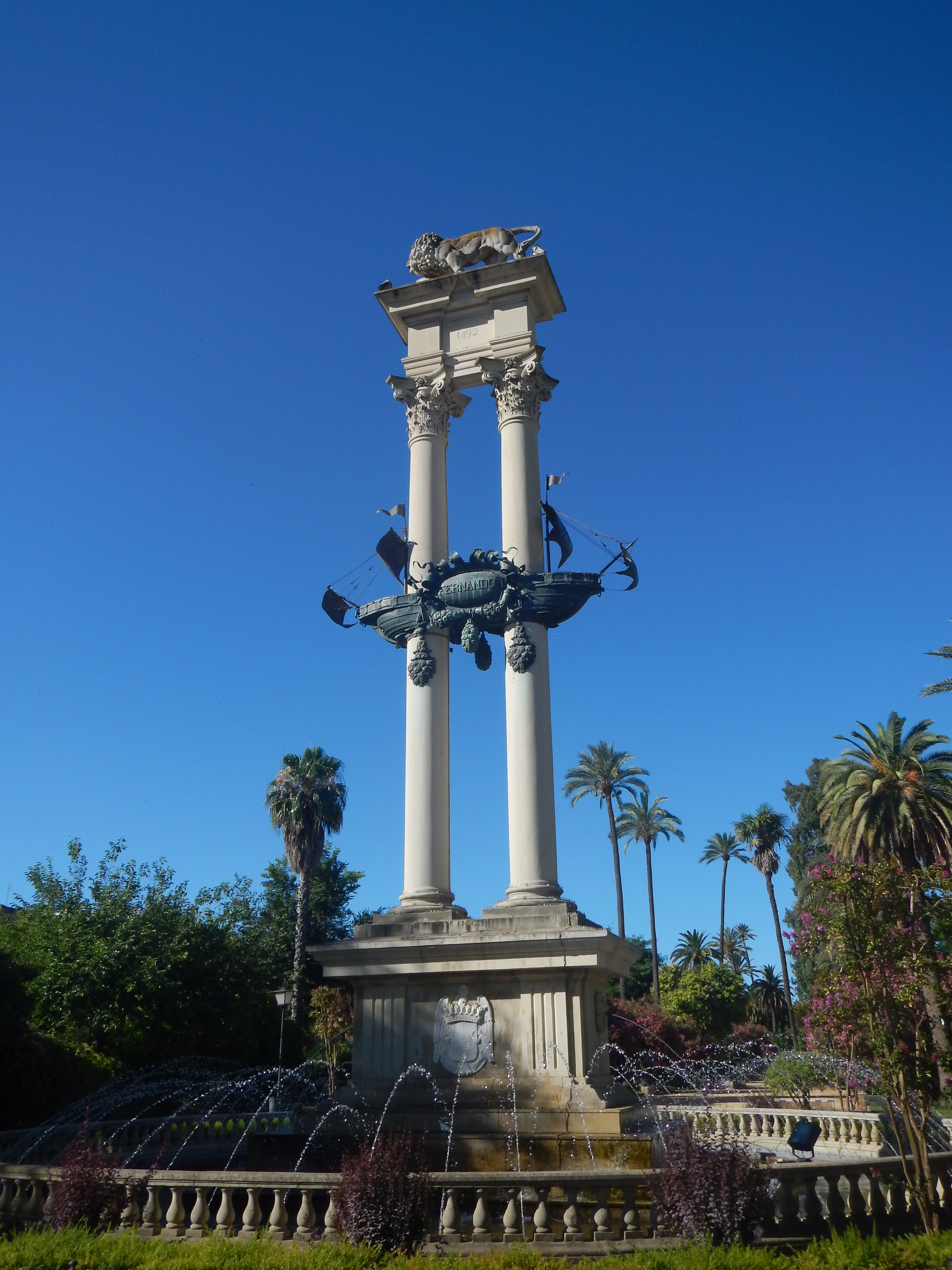 Monumento a Cristobal Colón en Sevilla.